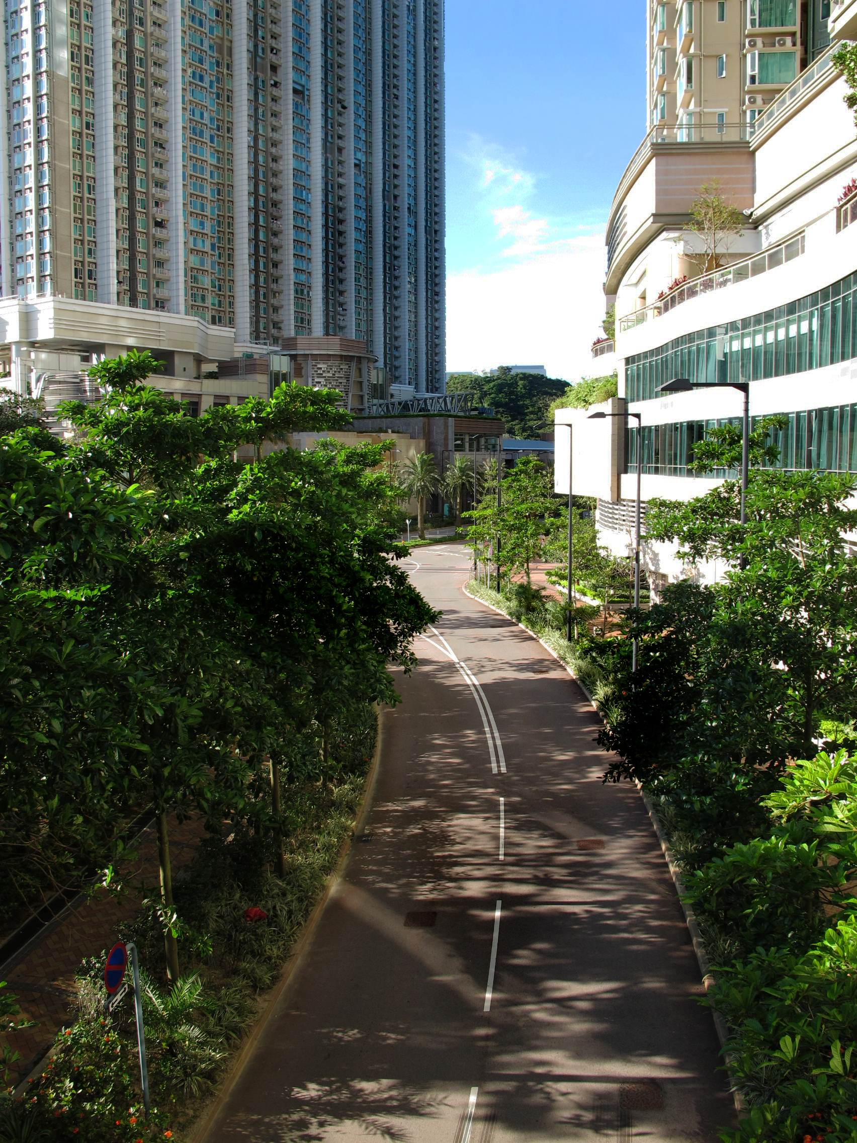 Lohas Park Sunrise Boulevard